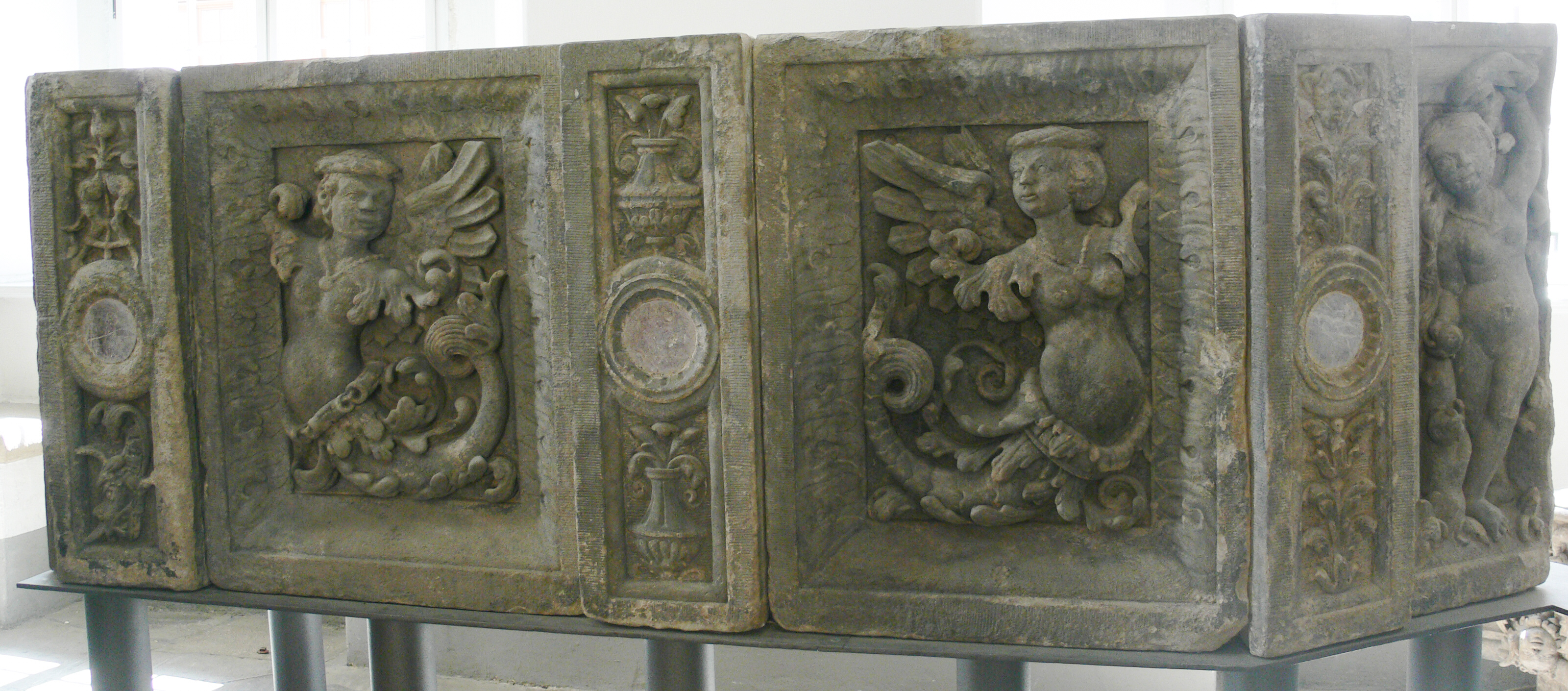 Rathaus Görlitz Rathaustreppe, Originalreliefs, ausgestellt im Inneren des Rathauses